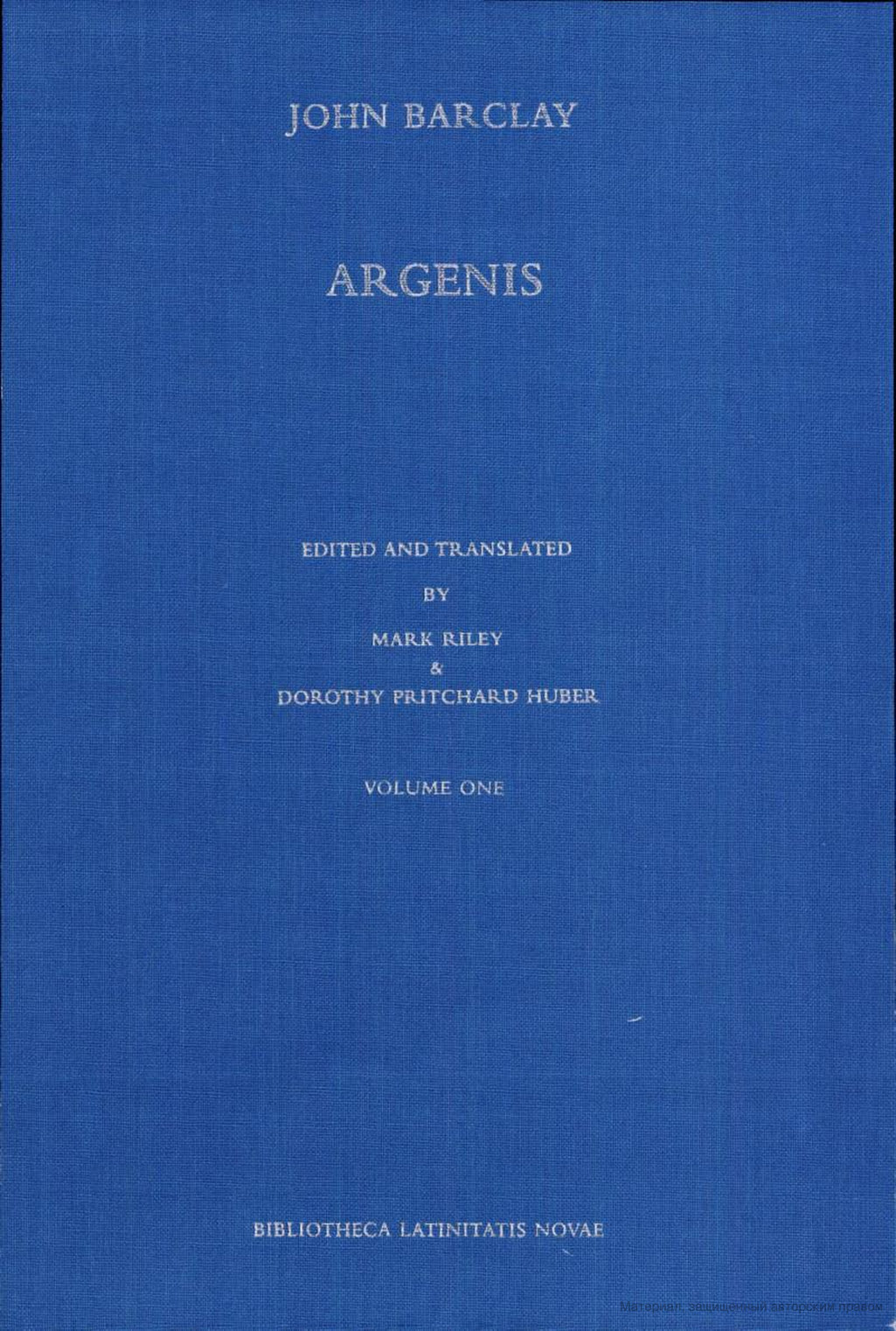 Обложка романа "Аргенида". Автор - Джон Беркли (1582 - 1621), перевод на английский язык Кингсмилла Лонга (1625)